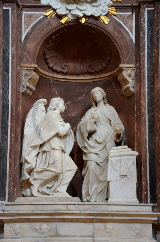 L'Annunciazione: gruppo marmoreo di Antonello e Giacomo Gagini (1545)